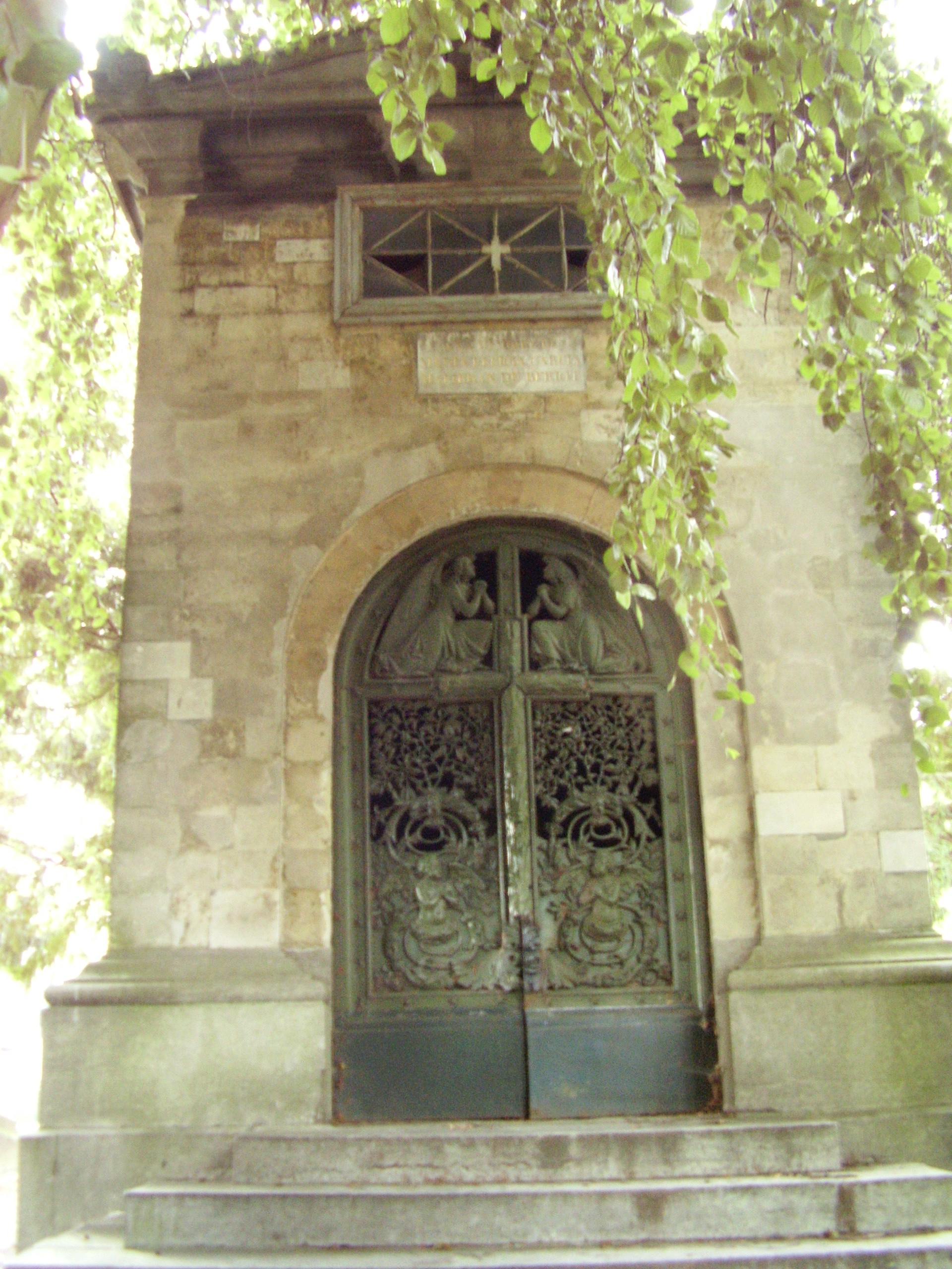 Description: Monument funéraire de Maria de la Felicidad Garcia dite La Malibran, Cimetière de Laeken (Bruxelles) / architecte Tilman-François Suys Author: User:Ben2 Date of creation: 10 août 2006 Source: Photo personnelle